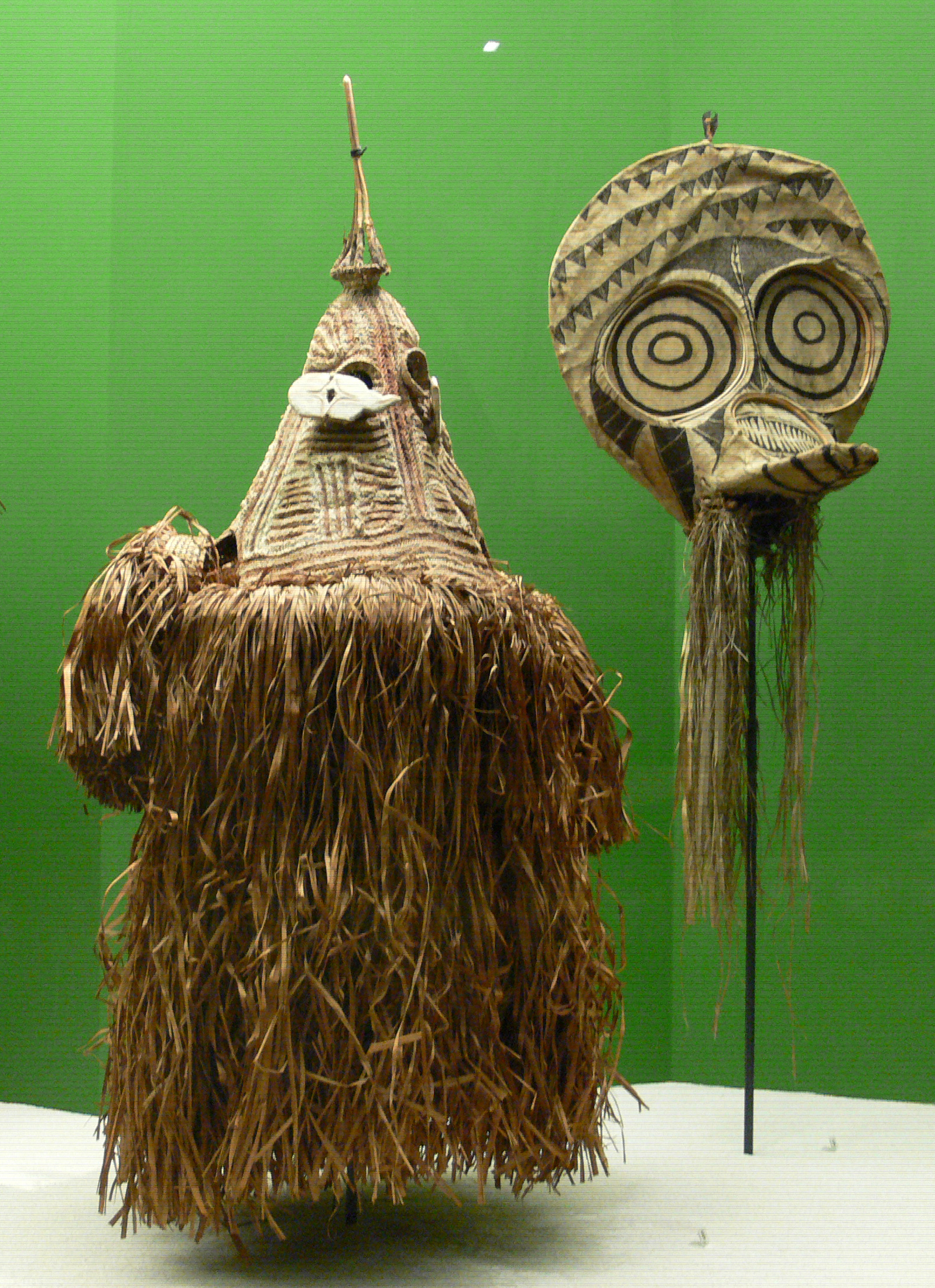 Zwei Masken (aus Neukaledonien oder Neuguinea, Beschriftung muss noch ergänzt werden) Collection: Ethnologisches Museum, Berlin-Dahlem